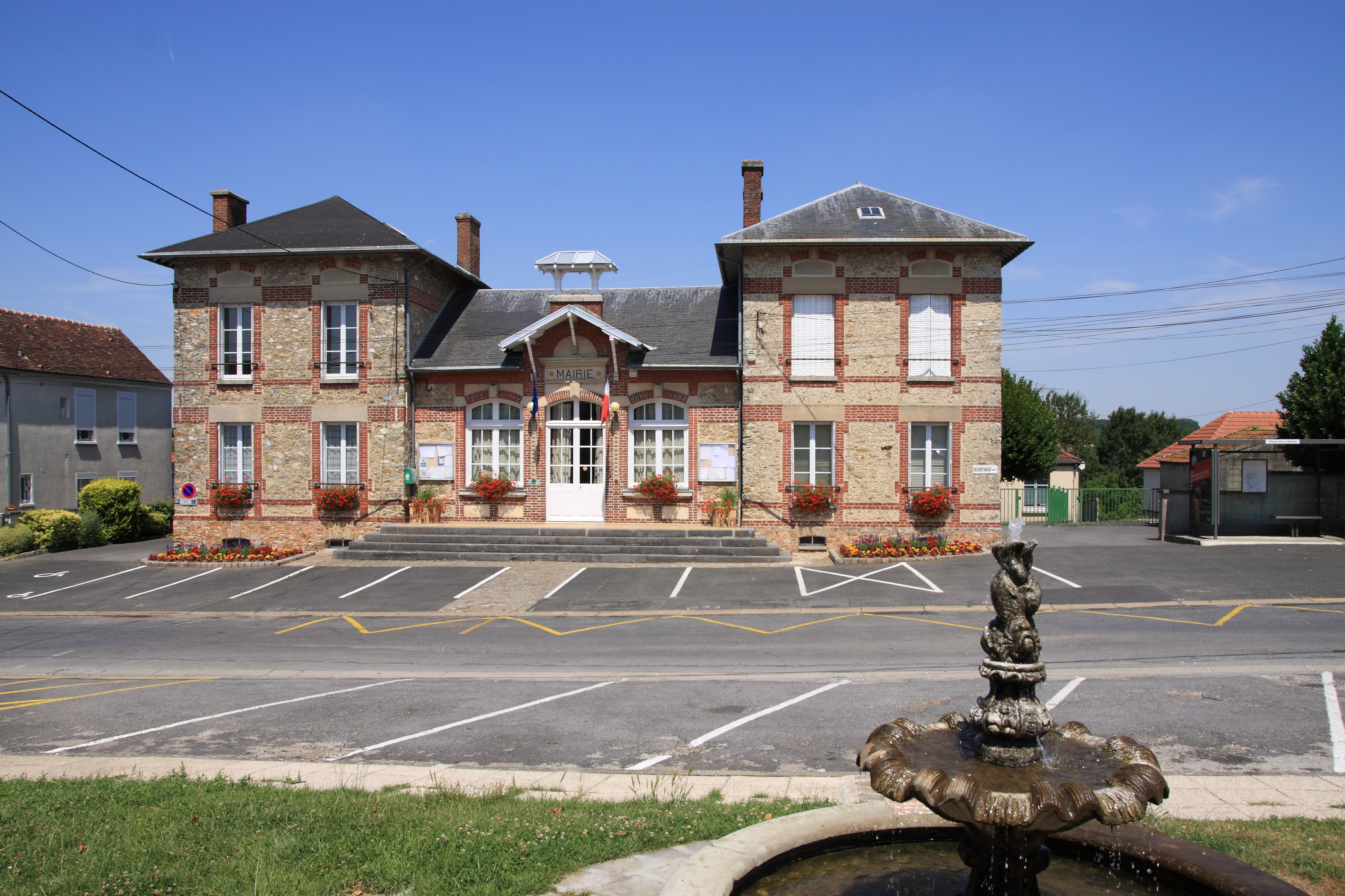 Mairie de Saint-Siméon (77)